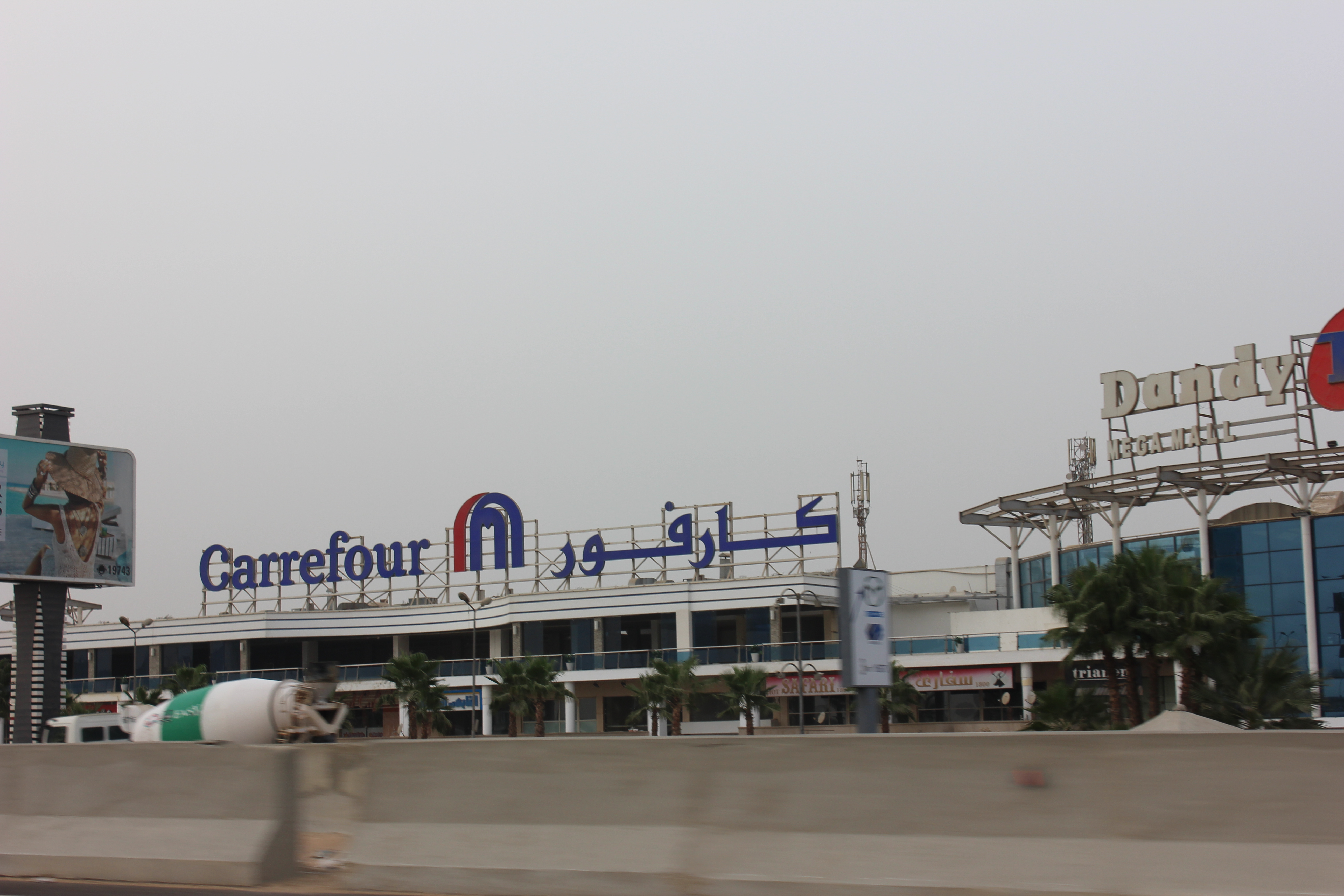 كارفور بالقاهرة.